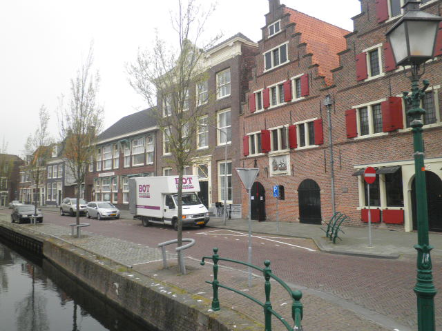 Onder de Boompjes de Noord-Hollandse stad Hoorn, gracht heeft de naam Turfhaven.